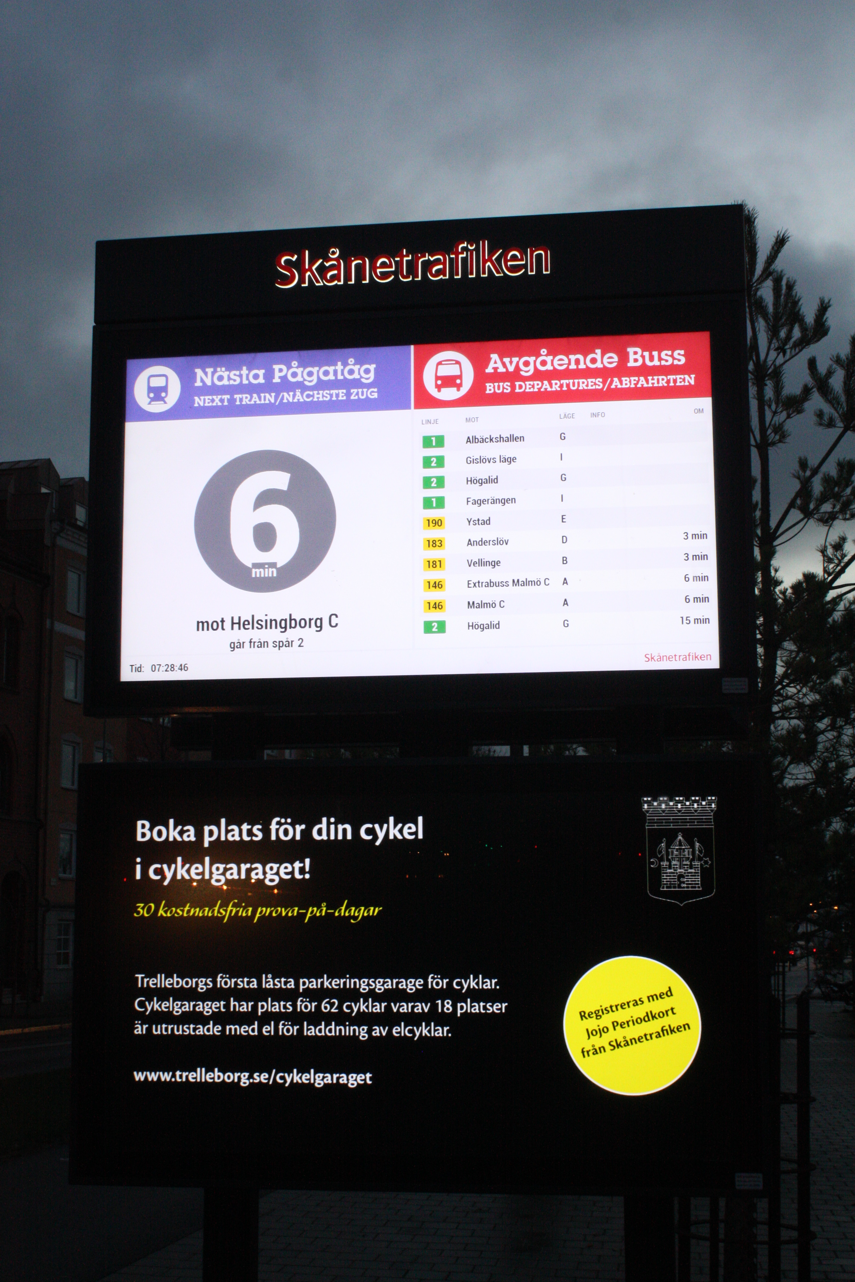 Um dos sistemas de exibição de partidas de trem e ônibus em Trelleborg Centralstation.